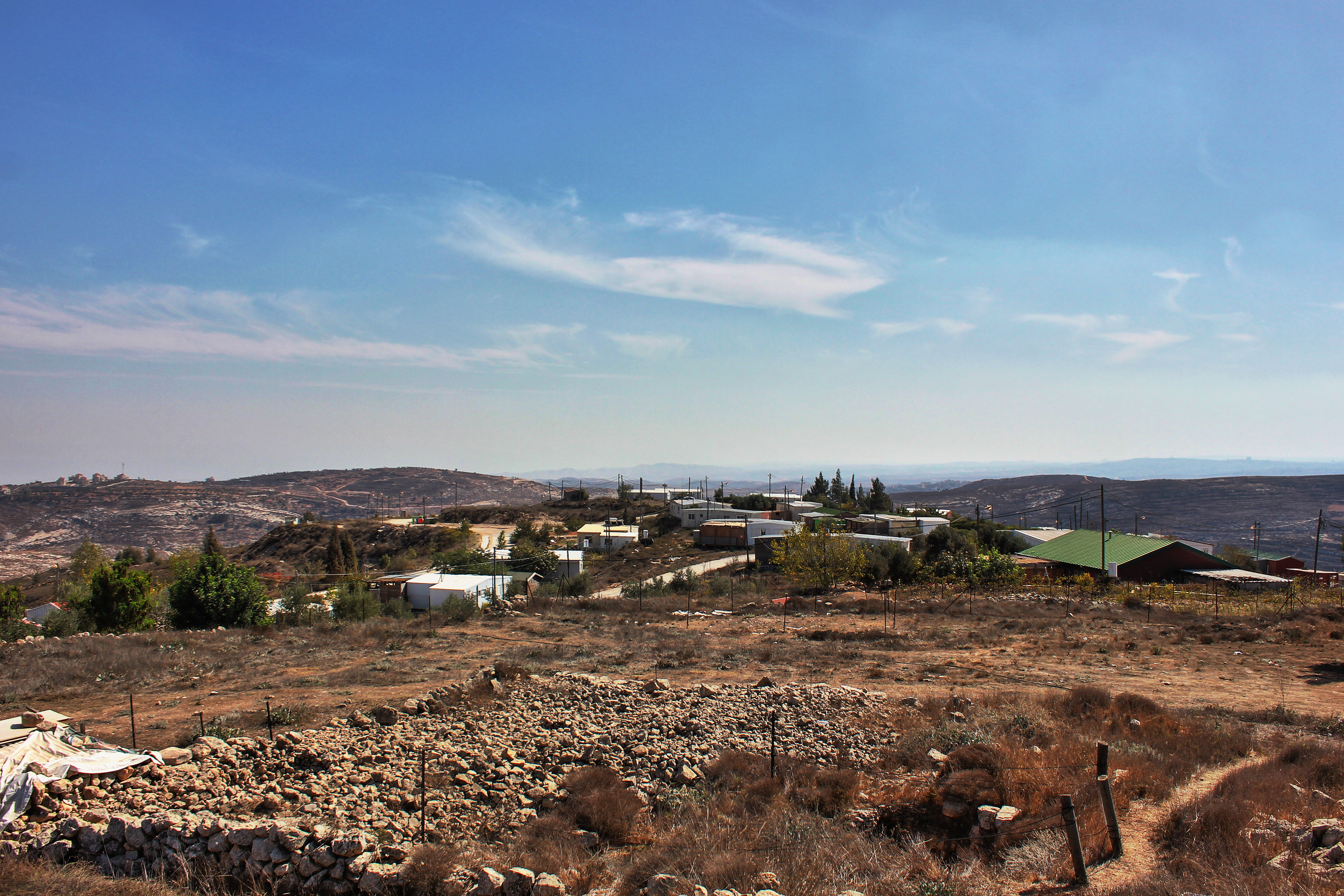 Amona